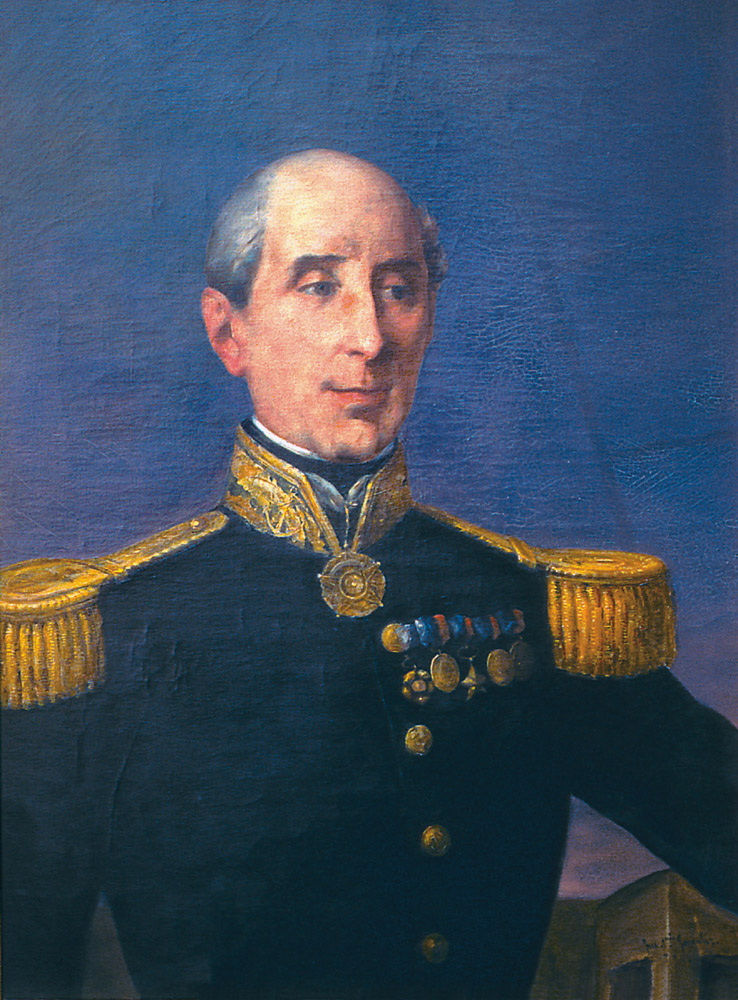 Manuel Blanco Encalada. Presidente de Chile